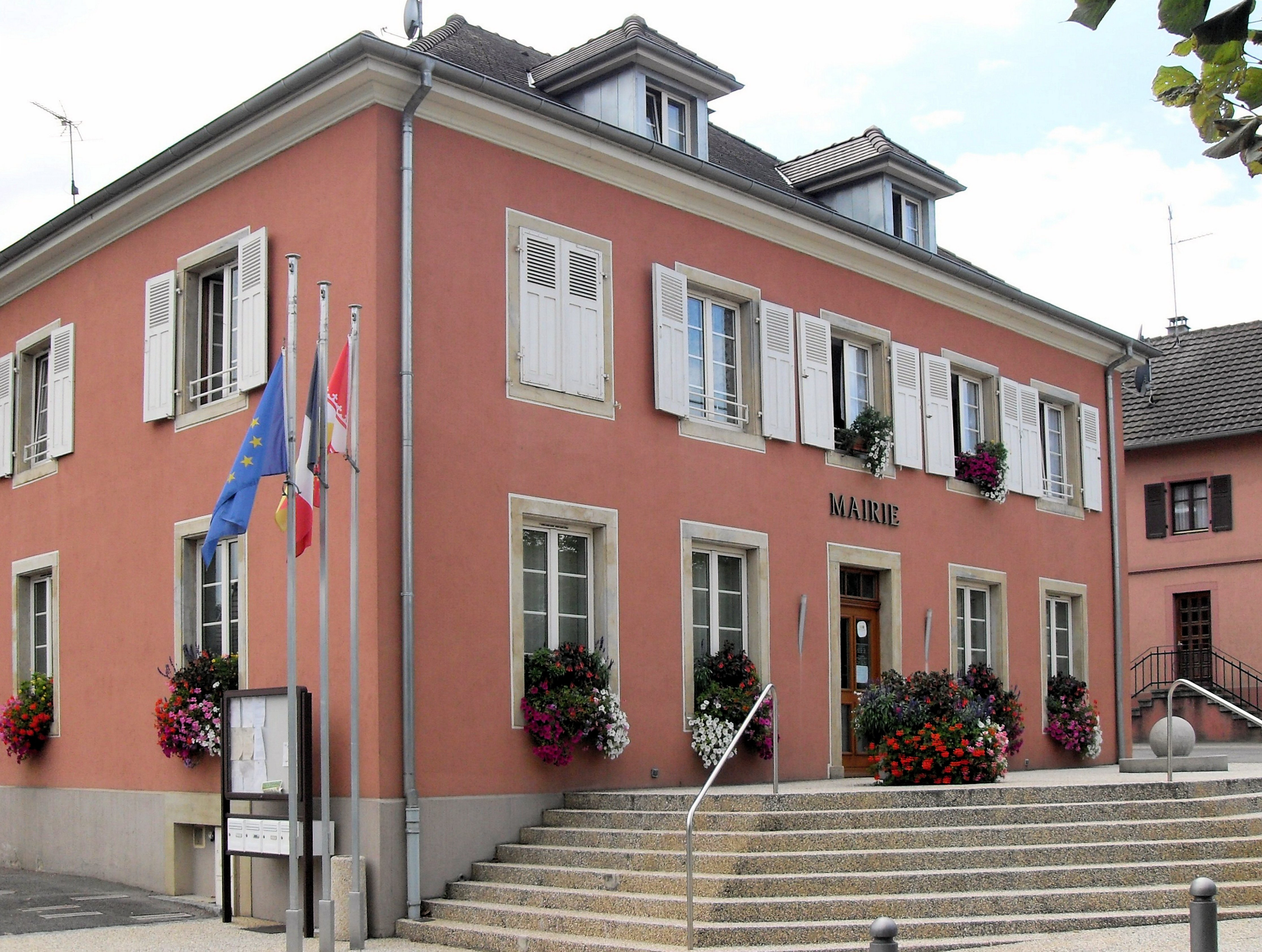 La mairie de Heimersdorf